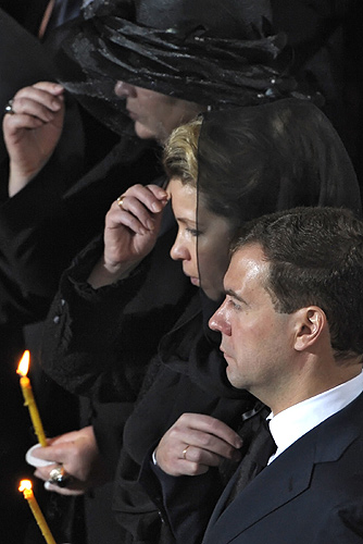 МОСКВА, ХРАМ ХРИСТА СПАСИТЕЛЯ. Дмитрий Медведев, Светлана Медведева и Людмила Путина на церемонии прощания с Патриархом Московским и всея Руси Алексием II.